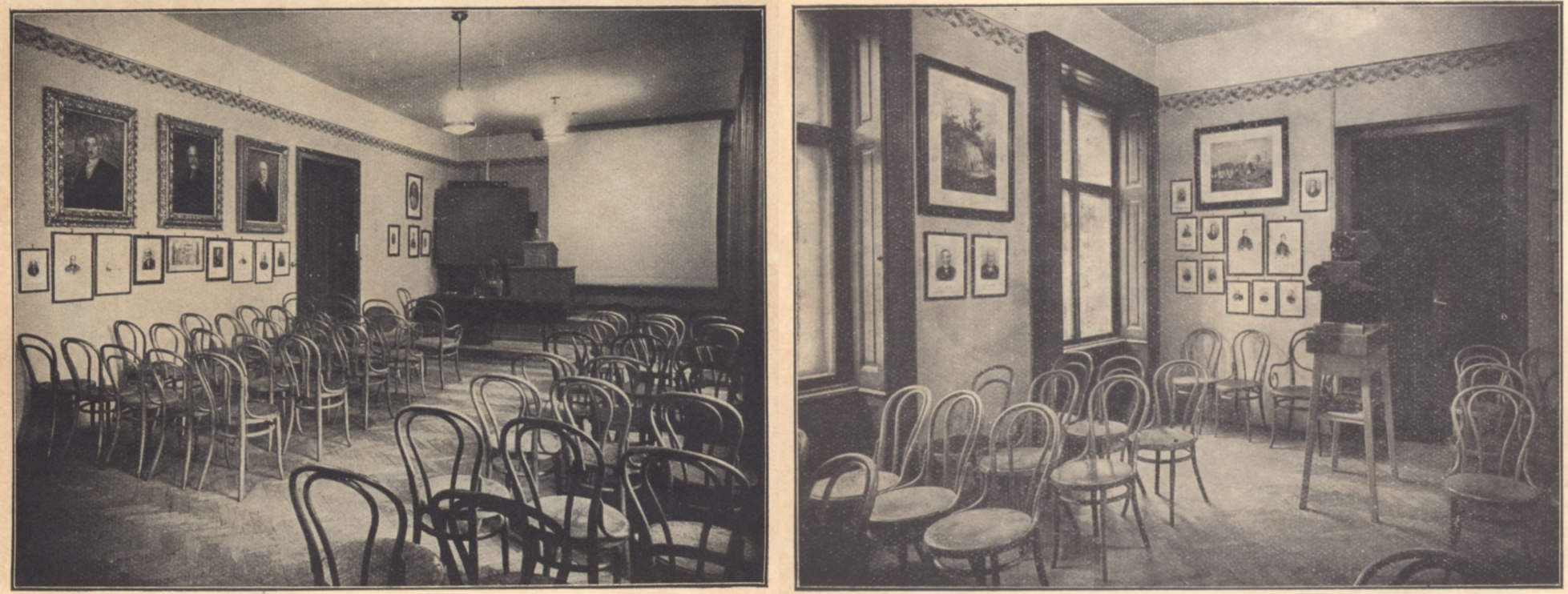 A Királyi Magyar Természettudományi Társulat előadóterme a Leitz-féle vetítőgéppel (Budapest Eszterházy utca 14/16. sz. első emelet)